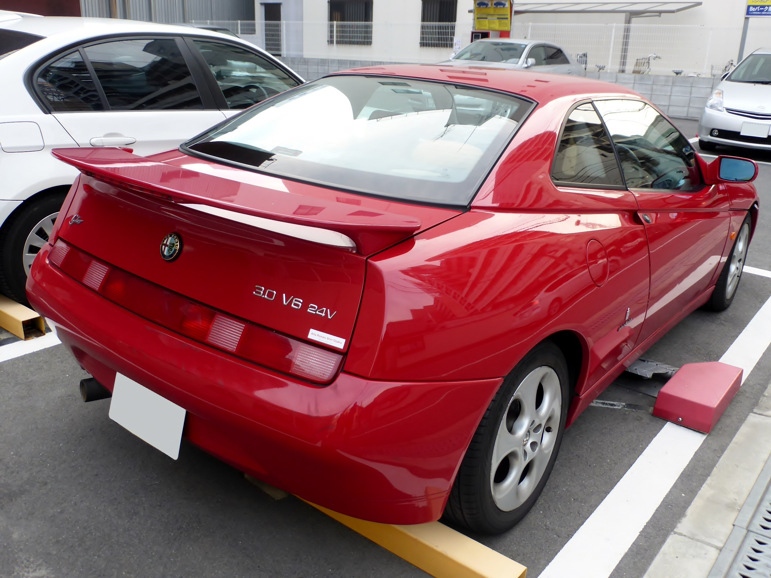 アルファ・ロメオGTV 3.0 V6 24Vをリアから撮影。